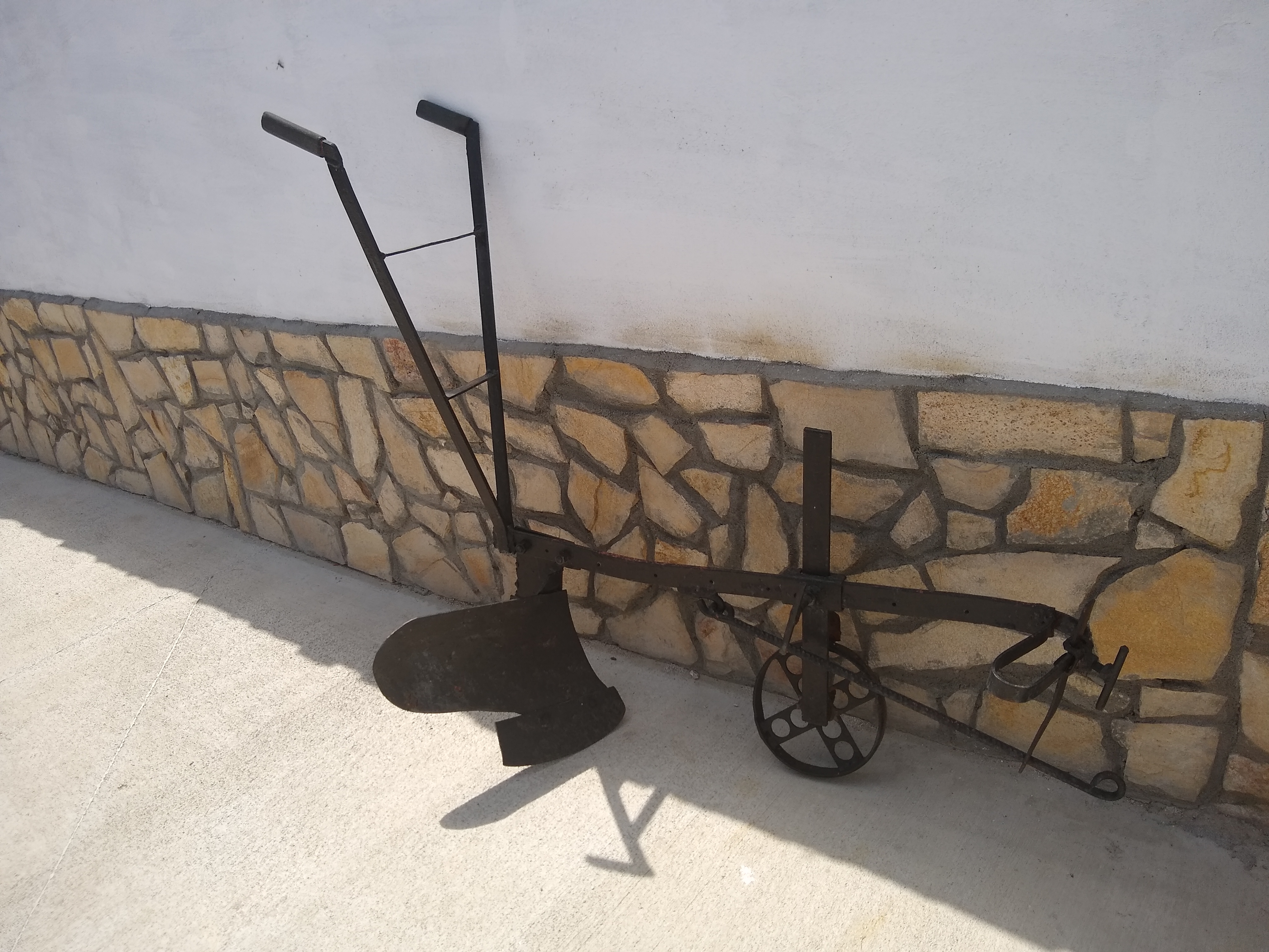 Рало.